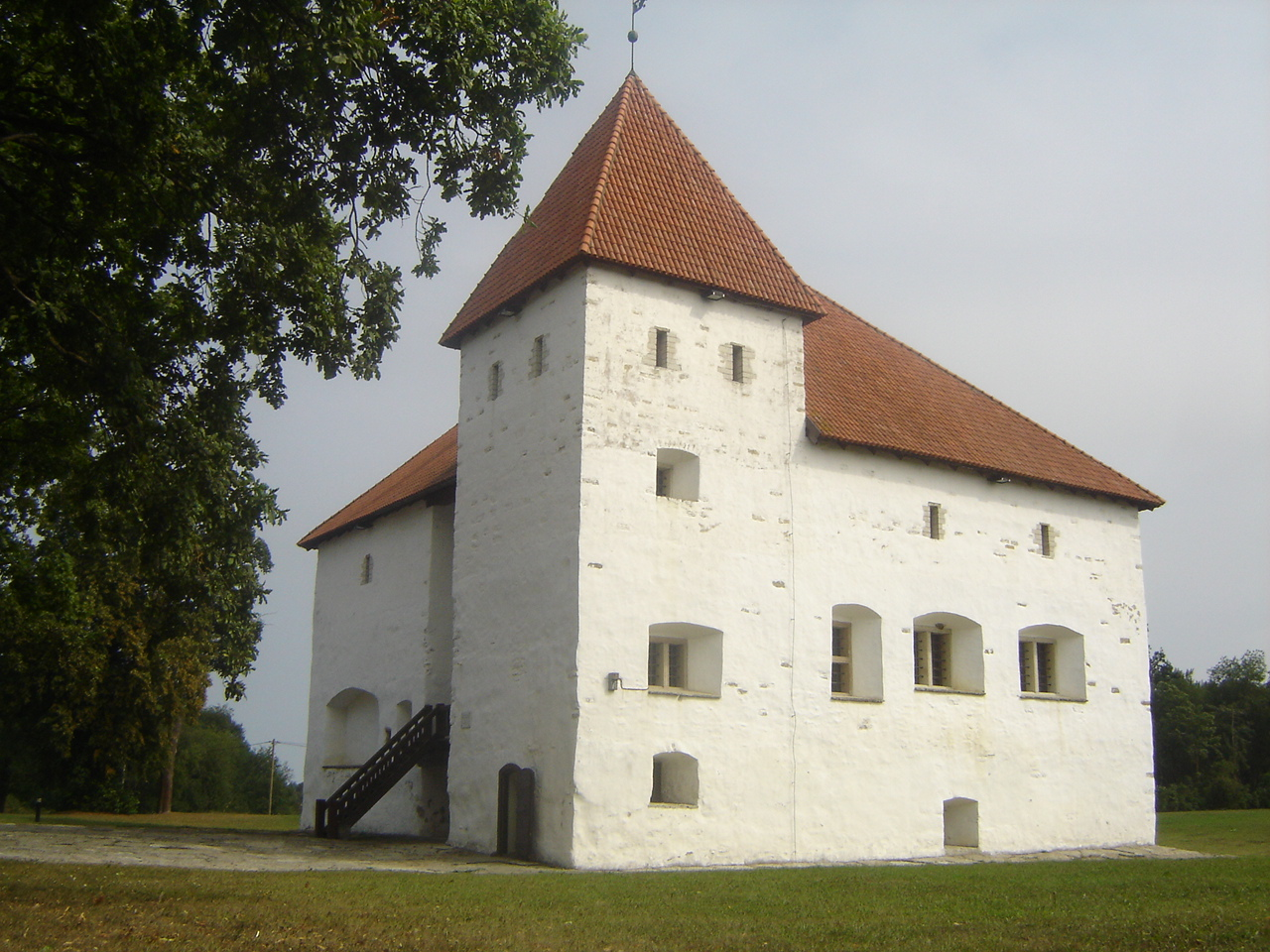 Purtse vasallilinnus